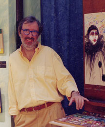 Description pierrerisch.jpg photo prise le 8 juin 2008 par l'utilisateur : Sainteu Auteur : Utilisateur Sainteu Permission lincence GFDL - en réponse à demande de permission, Sainteu a répondu que " Oui vous pouvez utiliser le contenu de ce document dont je suis l'auteur "